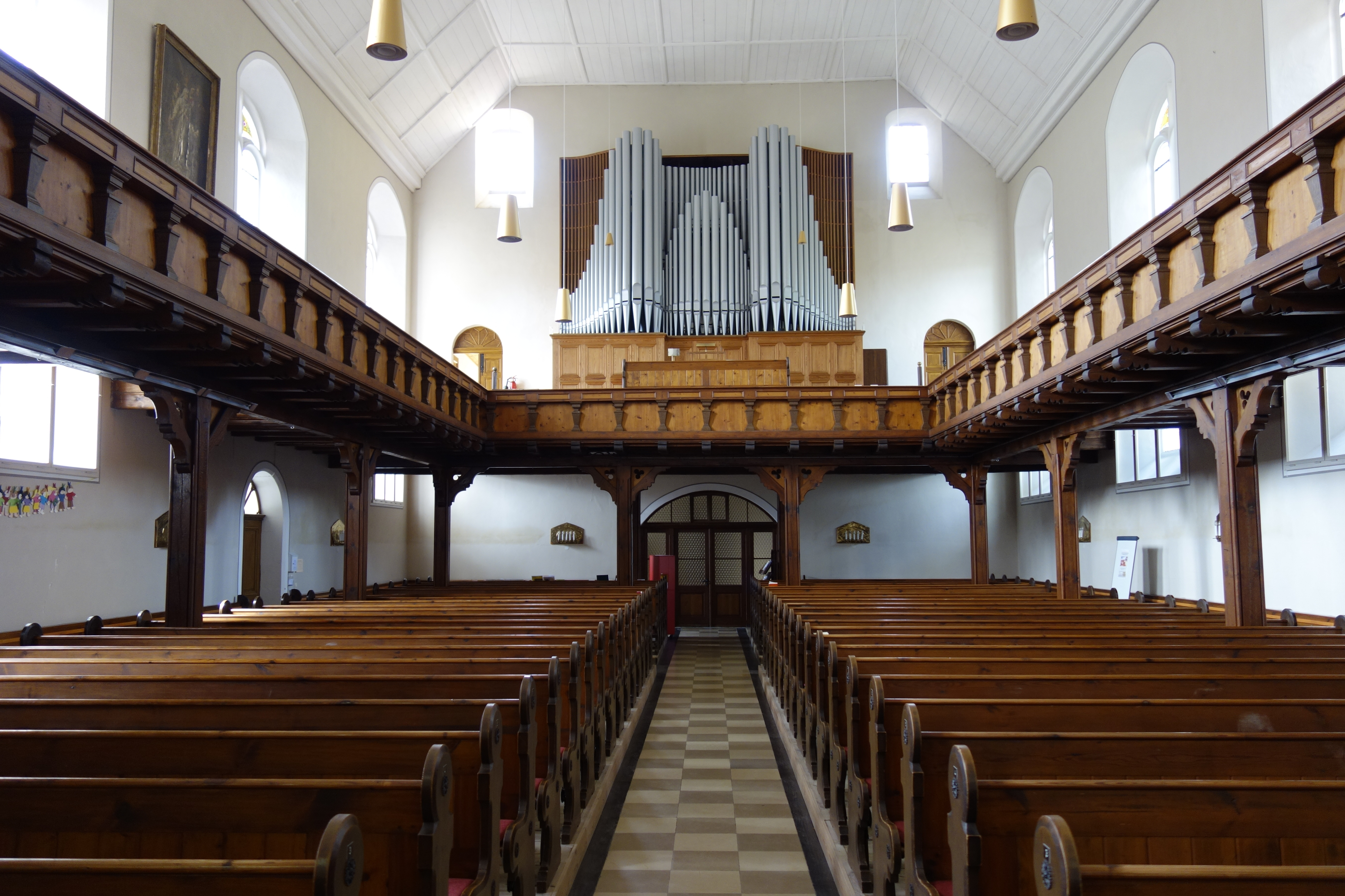 Kirche Königsbrück Juli 2017 (13)